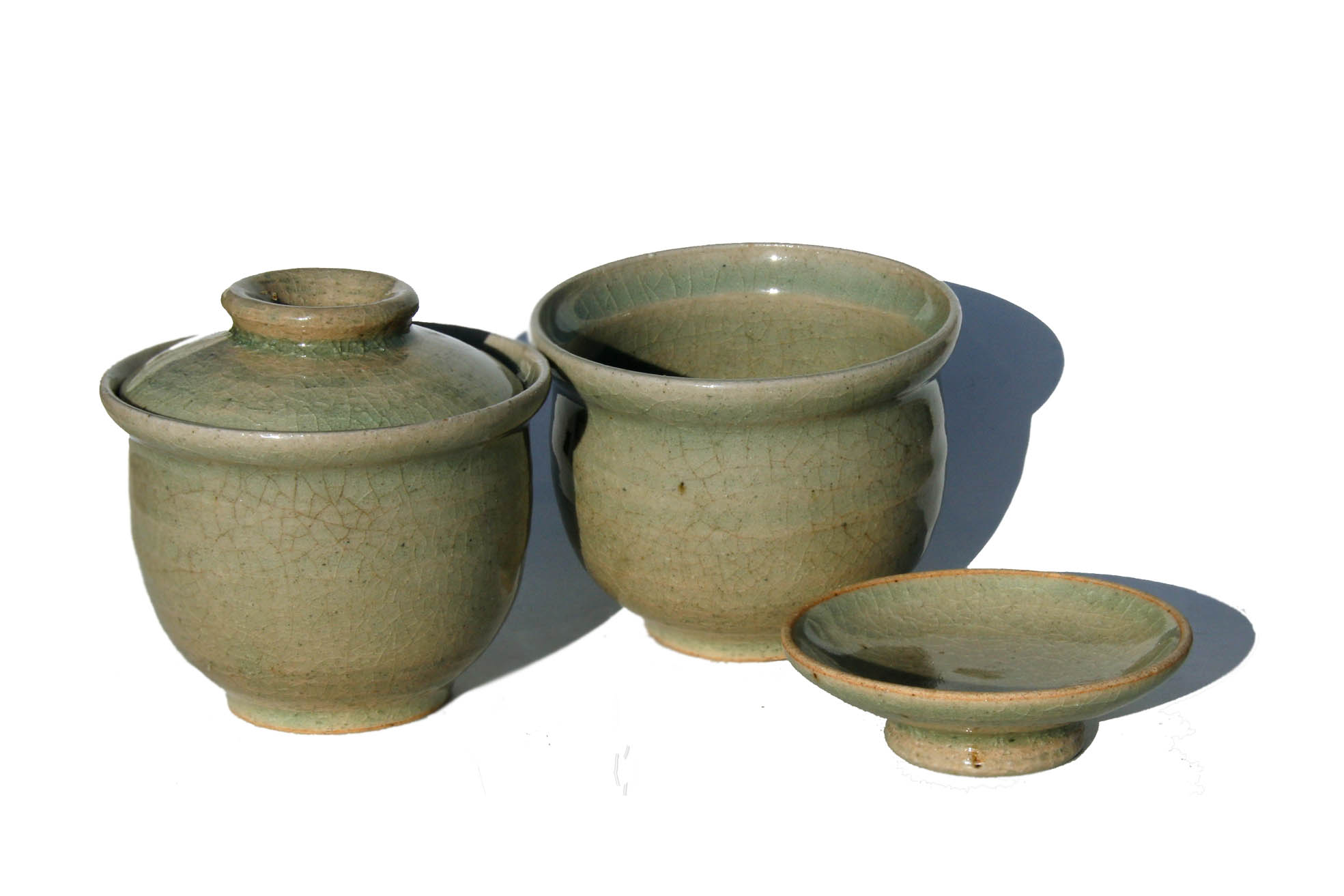 poterie traditionnelle japonaise